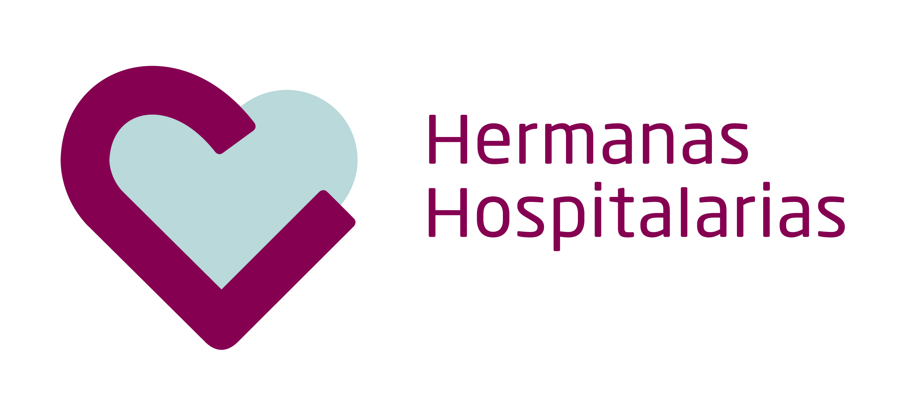 Institucion